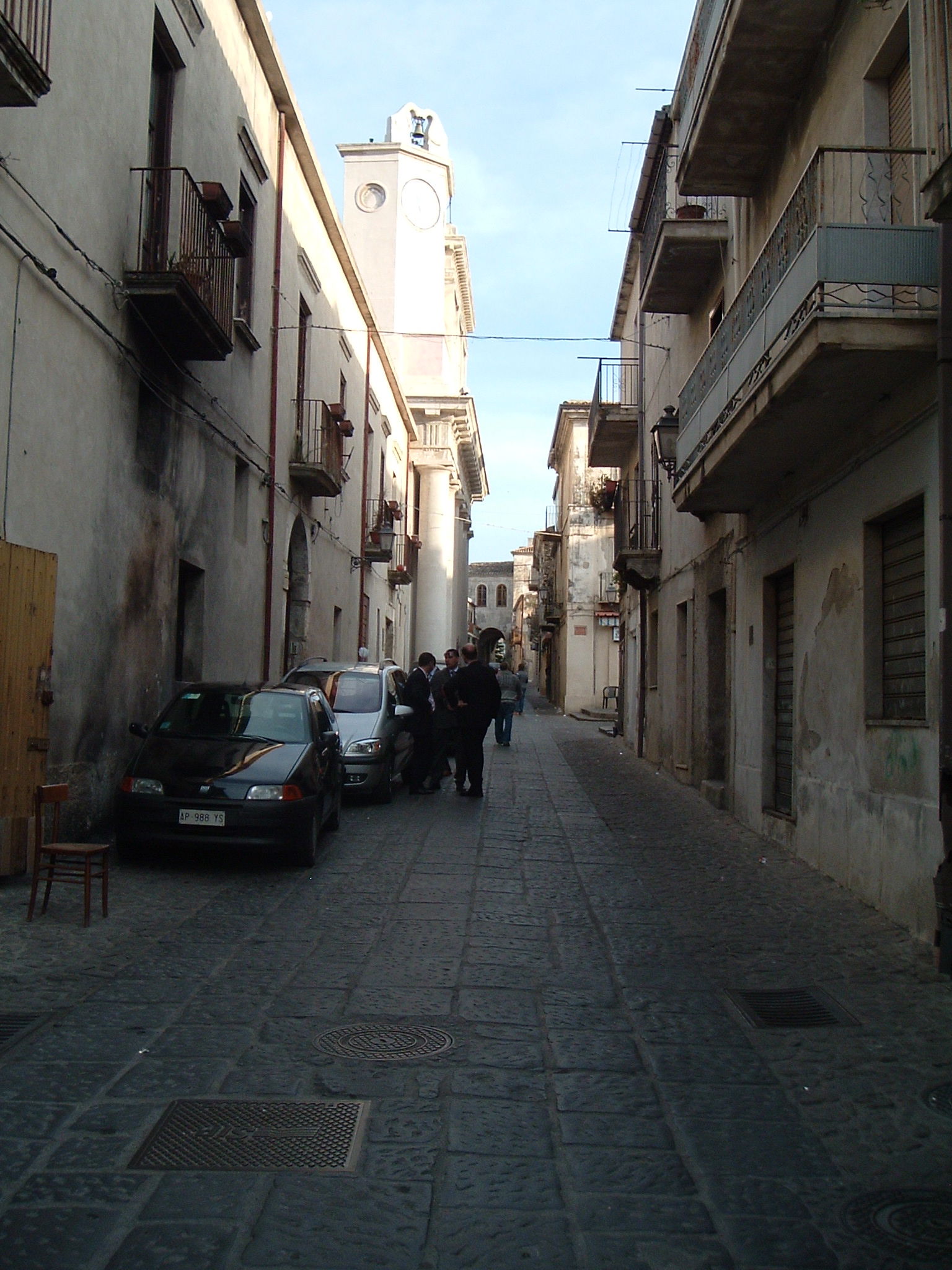 Vortix; scattata da me stesso; Corso XX settembre Cariati; GFDL; ...